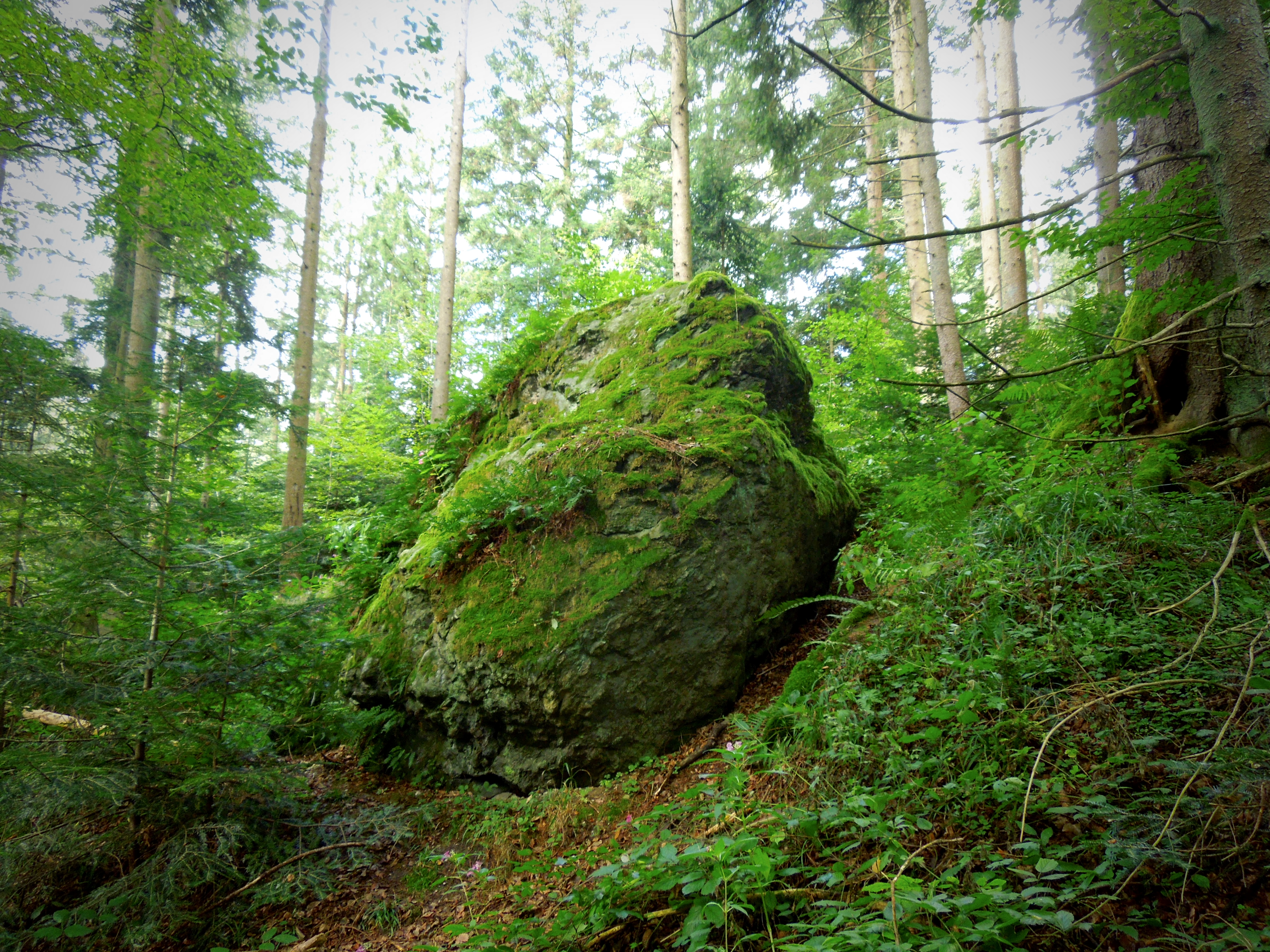 Der Findling Bräundlstein in der Gemeinde Babensham